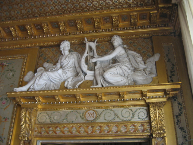 Le Boudoir de la reine, conçu par Pierre Rousseau pour la reine Marie-Antoinette, Fontainebleau, France